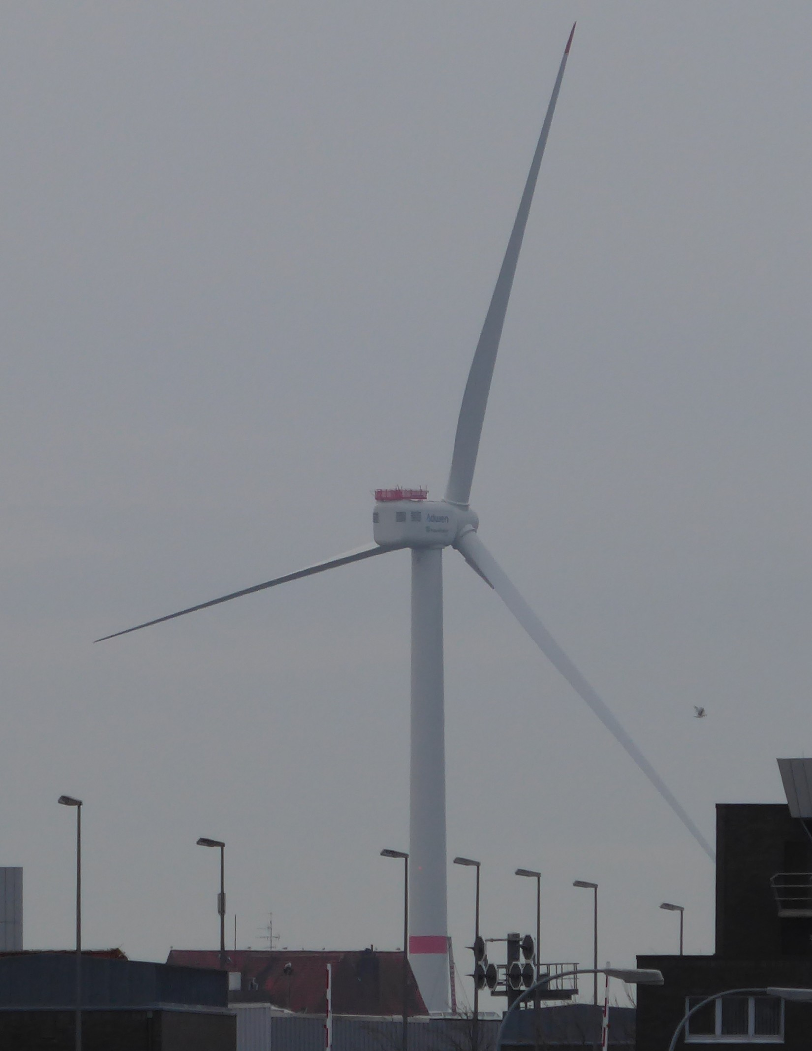 Windkraftanlage Adwen AD 8-180 Prototyp in Bremerhaven, 8 Megawatt, Inbetriebnahme am 27.07.2017, 114,7 Nabenhöhe, 180 m Rotordurchmesser